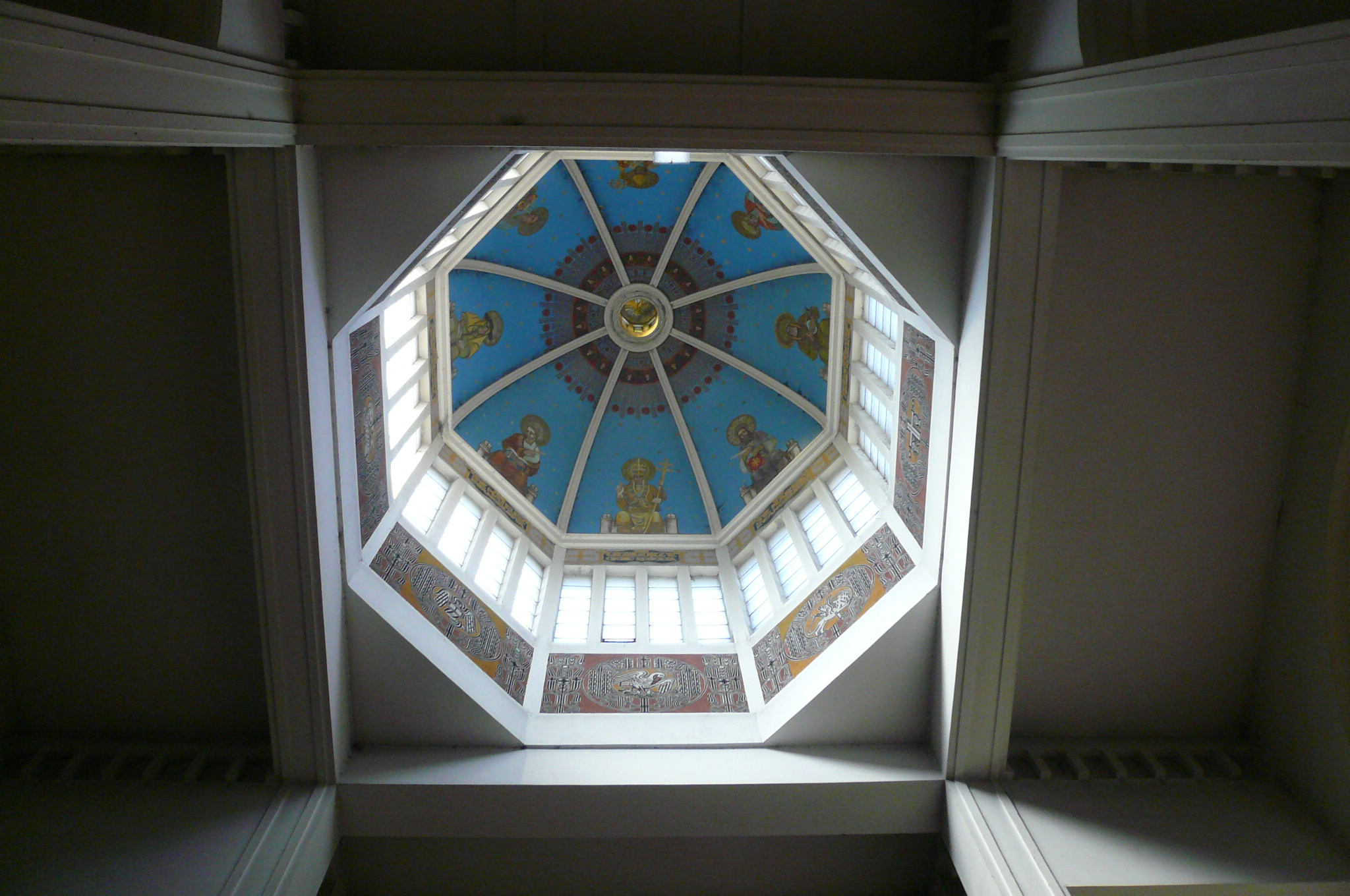 Wnętrze kopuły kościoła św. Józefa Oblubieńca Najświętszej Maryi Panny na Kole w Warszawie